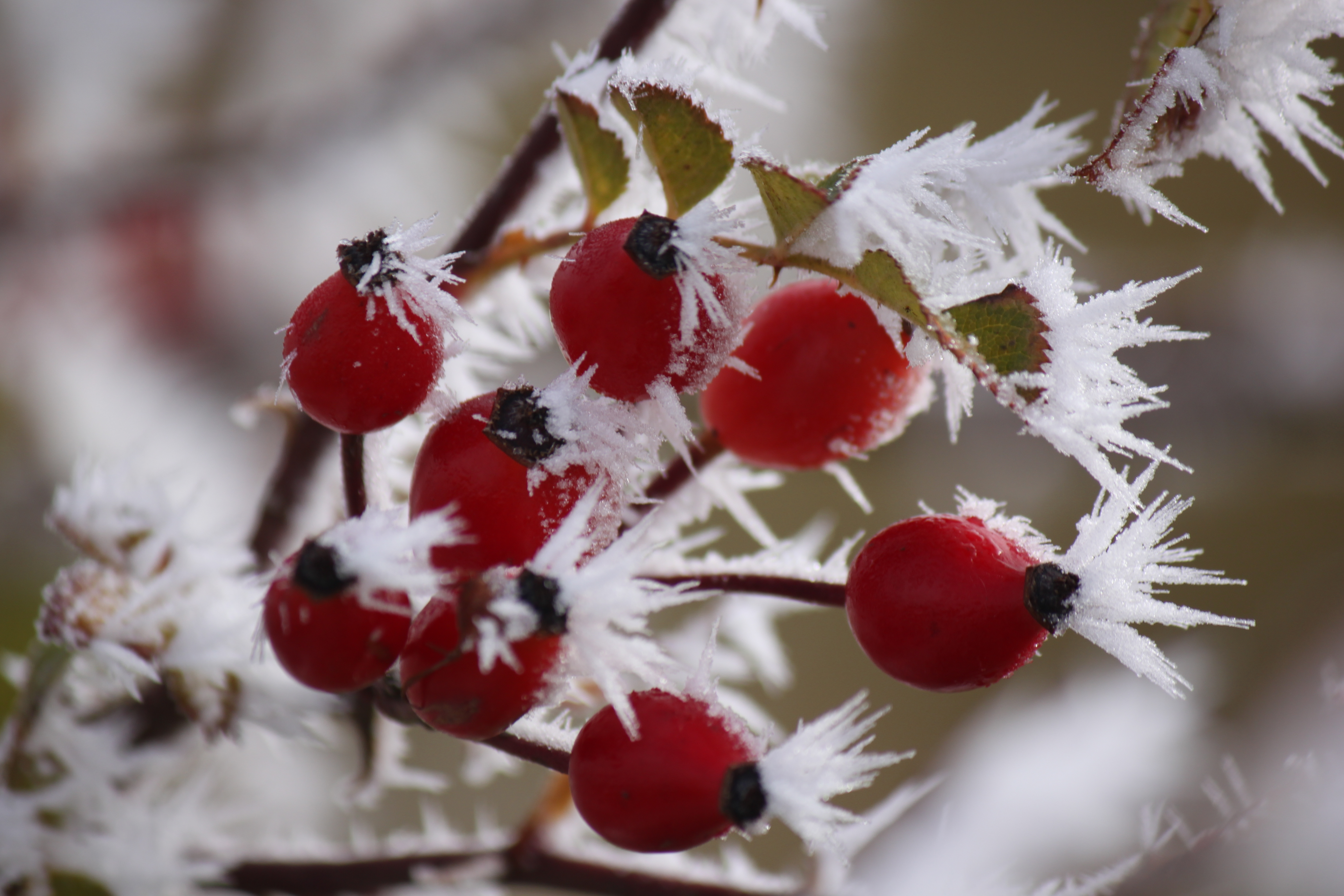 Detalle de formación de escarcha en bayas